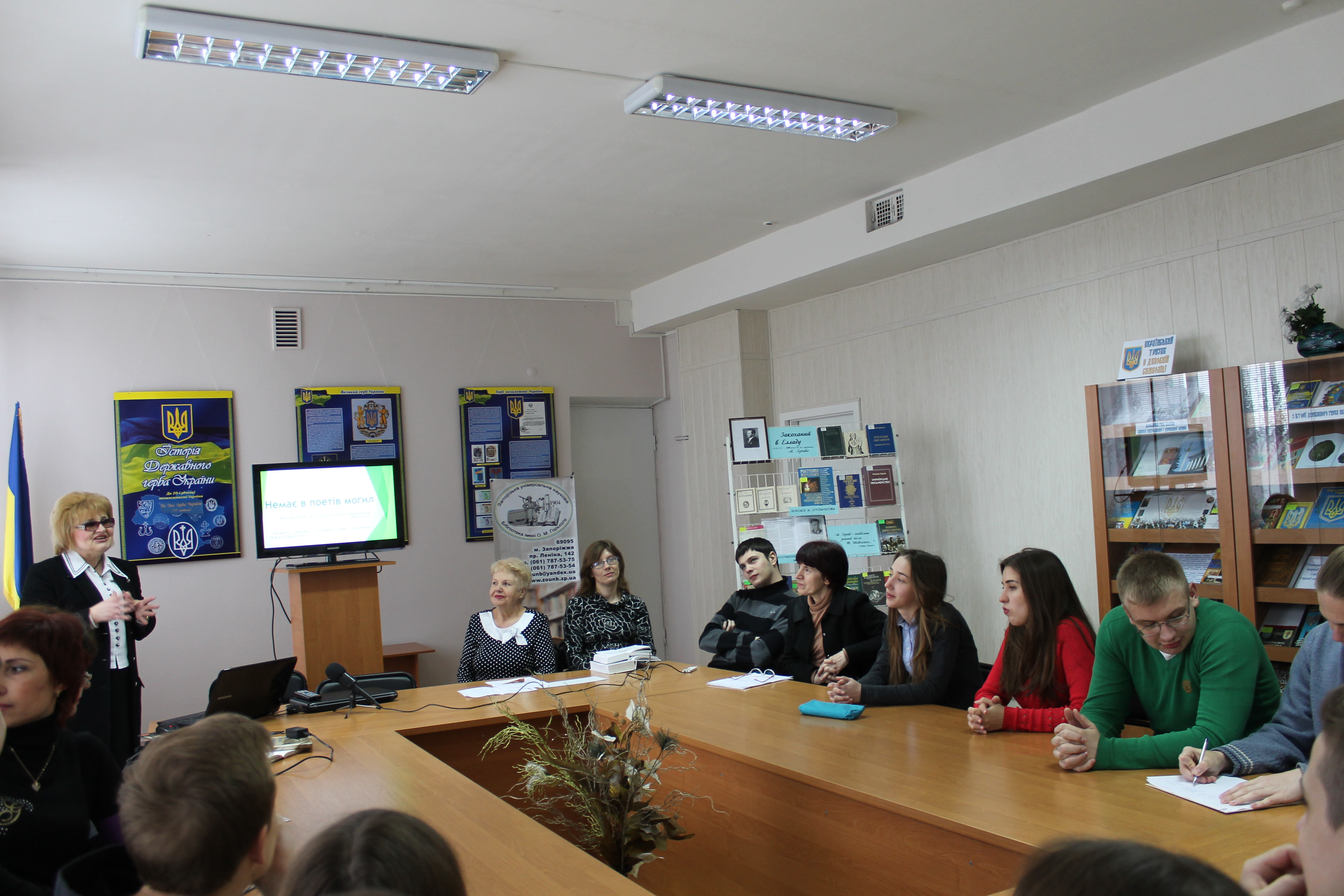 Фото